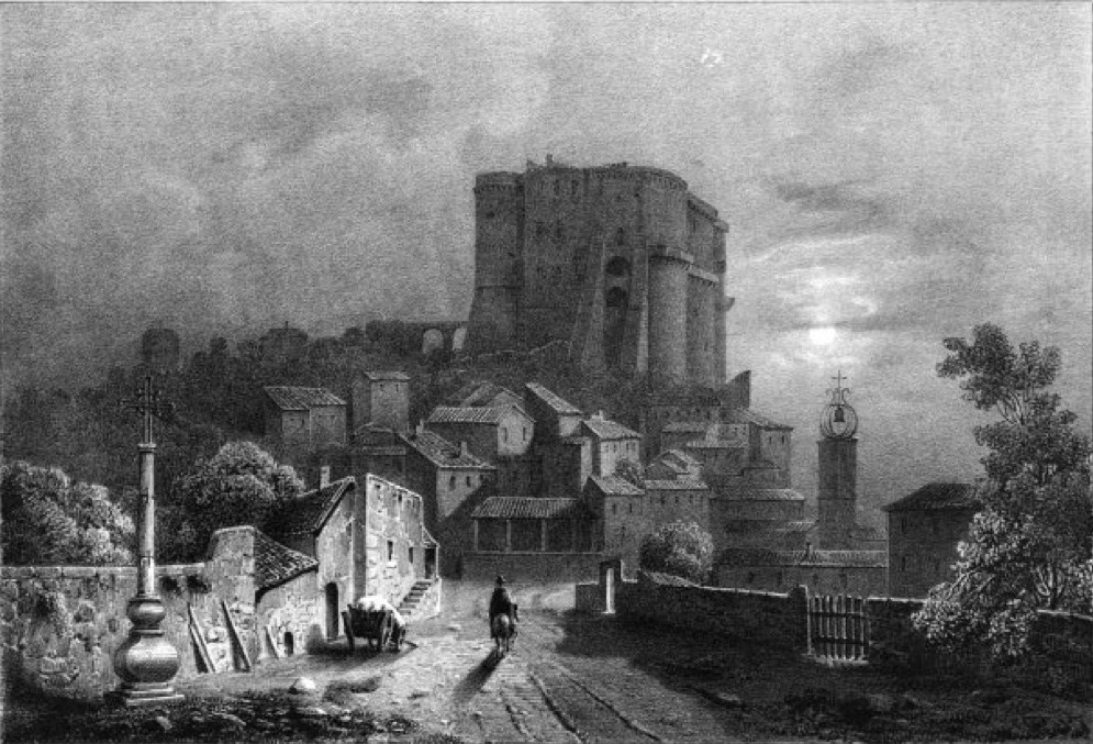 Album du Dauphiné - tome IV, litographie de Suze-la-Rousse (Drome)